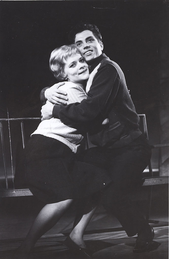 Näyttelijät Vili Auvinen ja Eila Roine Tampereen Työväen teatterin näytelmässä Max Frisch: Andorran tasavalta, vuonna 1962